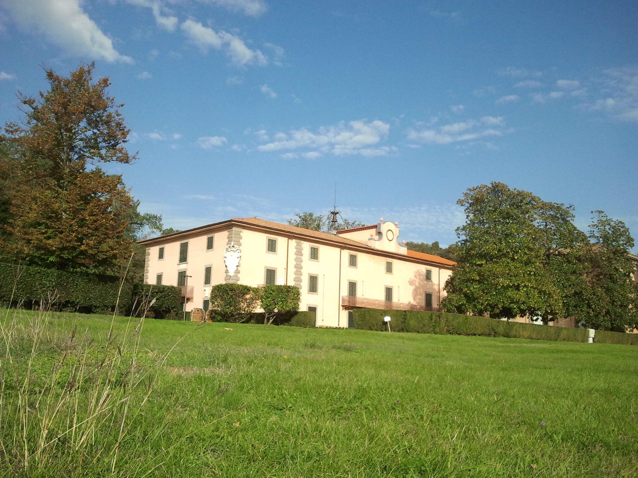 Parco Villa Demidoff (Pratolino) SAMSUNG